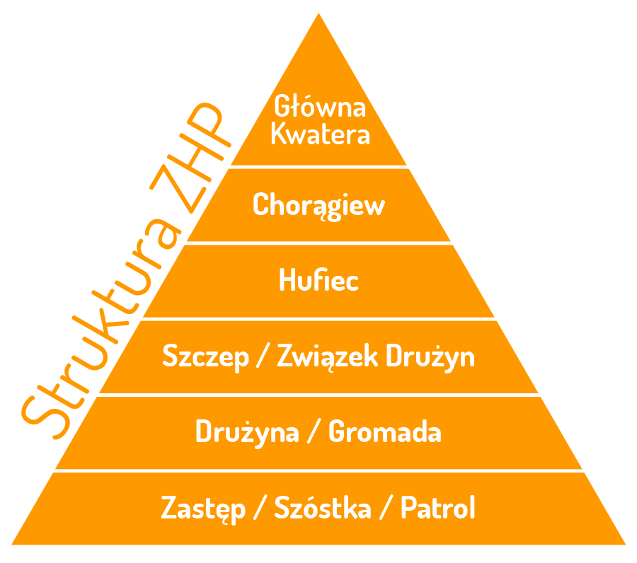 Struktura ZHP